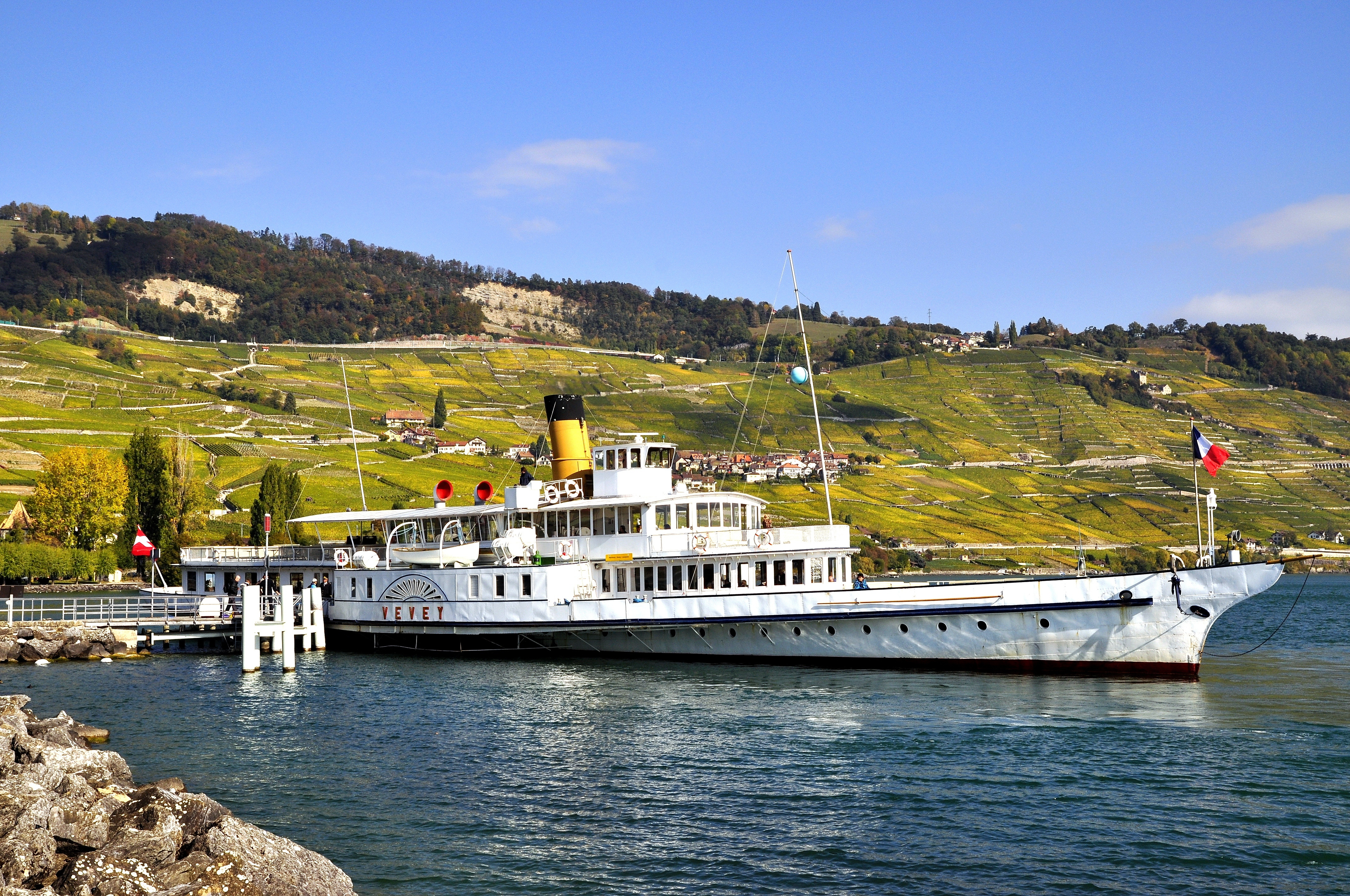 Compagnie Générale de Navigation sur le lac Léman,Vessel,Paddle steamer Vevey